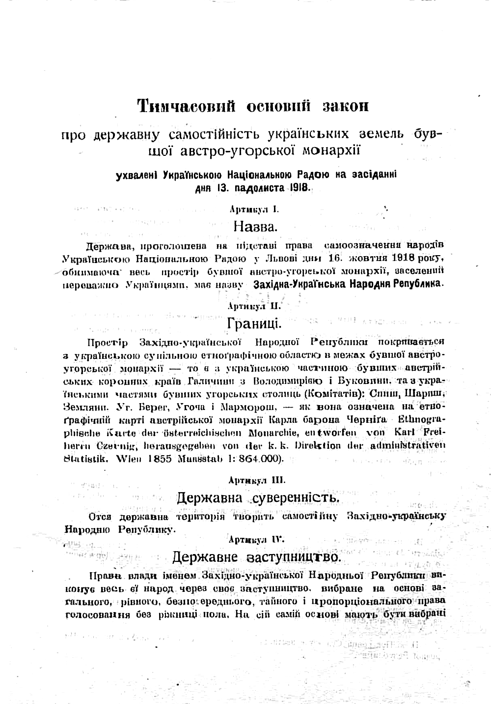 Тимчасовий основний закон про державну самостійність українських земель бувшої австро-угорської монархії, ухвалений Українською Національною Радою на засіданню 13 падолиста 1918